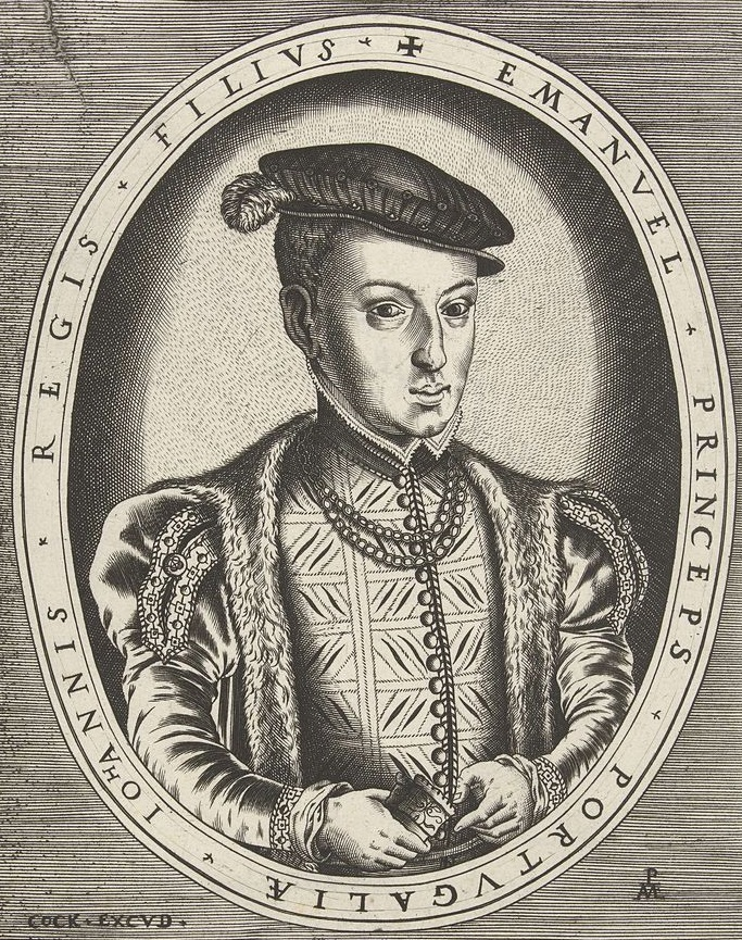 Portret van Johan Manuel van Portugal, Pieter van der Heyden, Hieronymus Cock, c. 1540 - 1554